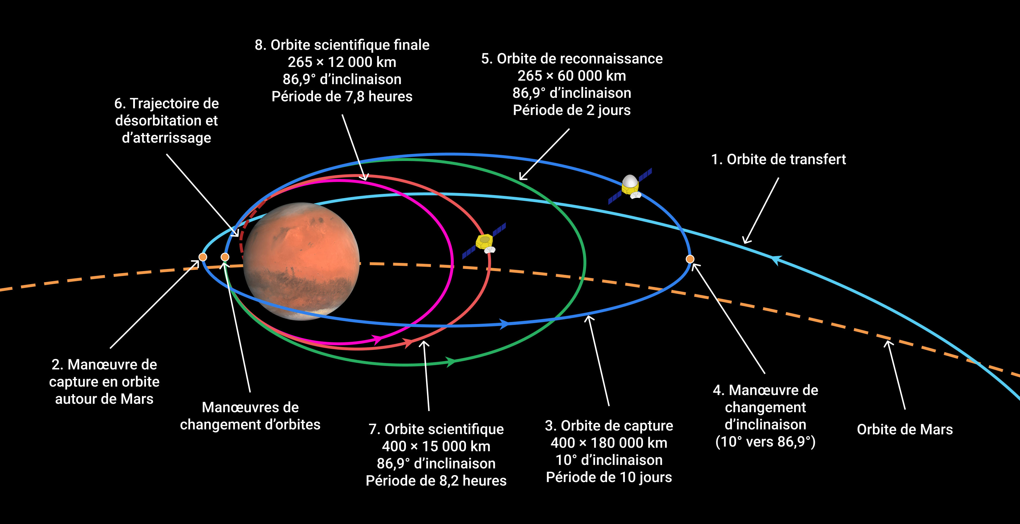 Schéma de la trajectoire orbitale de Tianwen-1 autour de Mars, et représentation des différentes orbites parcourues durant la mission.